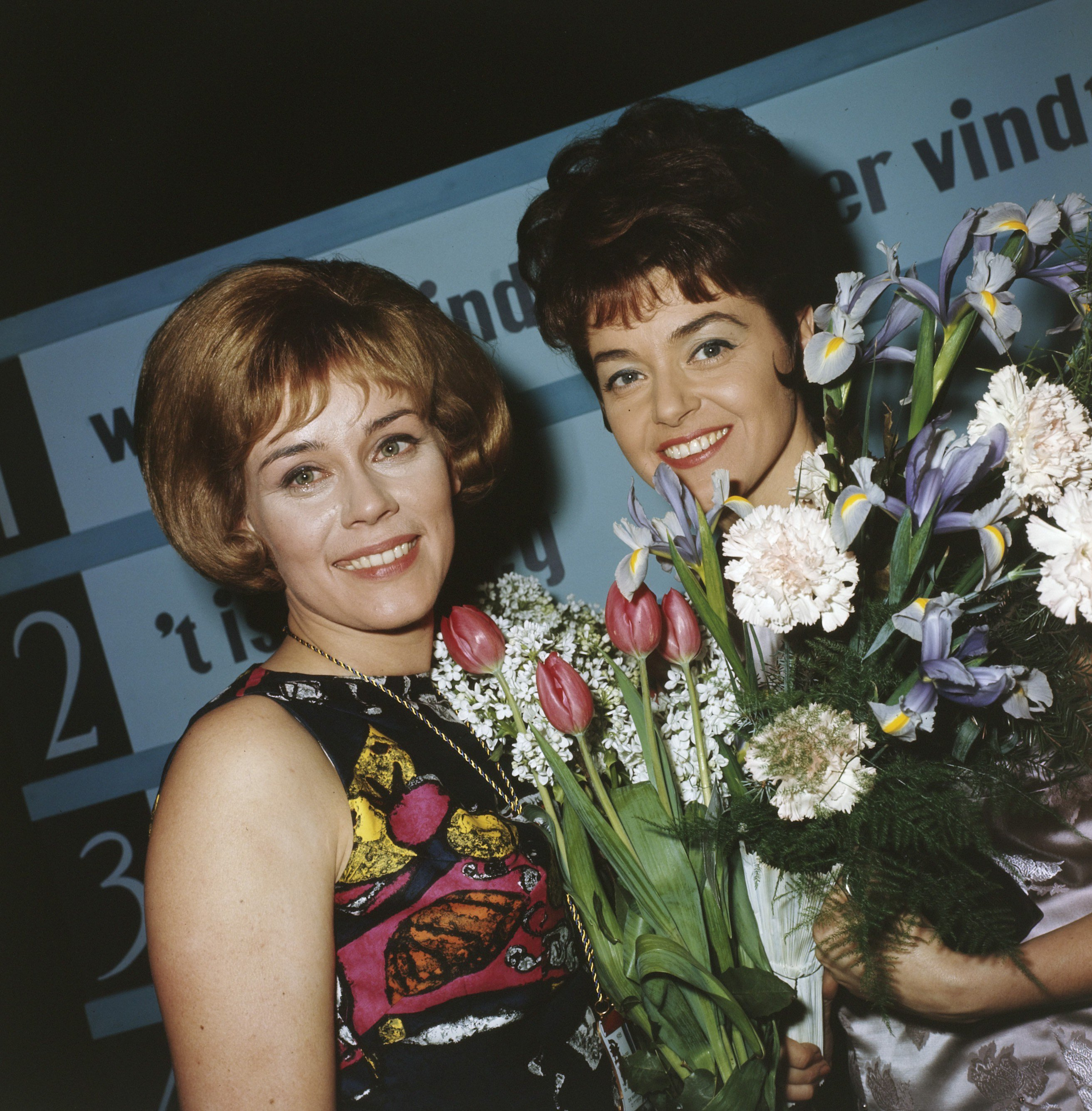 Collectie / Archief : Fotocollectie Anefo Reportage / Serie : [ onbekend ] Beschrijving : De zangeres Conny Vandenbos wint het het Nederlands Songfestival met het lied "'t is genoeg". Hier samen met Teddy Scholten Datum : 1965 Trefwoorden : zangeressen Persoonsnaam : Scholten, Teddy, Vandenbos, Conny Fotograaf : Fotograaf Onbekend / Anefo Auteursrechthebbende : Nationaal Archief Materiaalsoort : Dia (kleur) Nummer archiefinventaris : bekijk toegang 2.24.01.07 Bestanddeelnummer : 254-7210